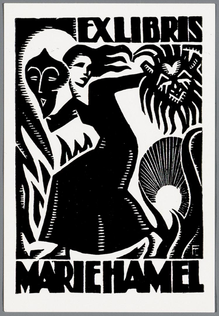 Ex libris Marie Hamel (Amsterdam, 4 december 1896 – Laren, 23 juni 1964) door Fré Cohen 078, 13-11-2002, 15:19, 8C, 6796x5566 (1203+2357), 100%, JHM, 1/80 s, R40.1, G21.5, B29.3